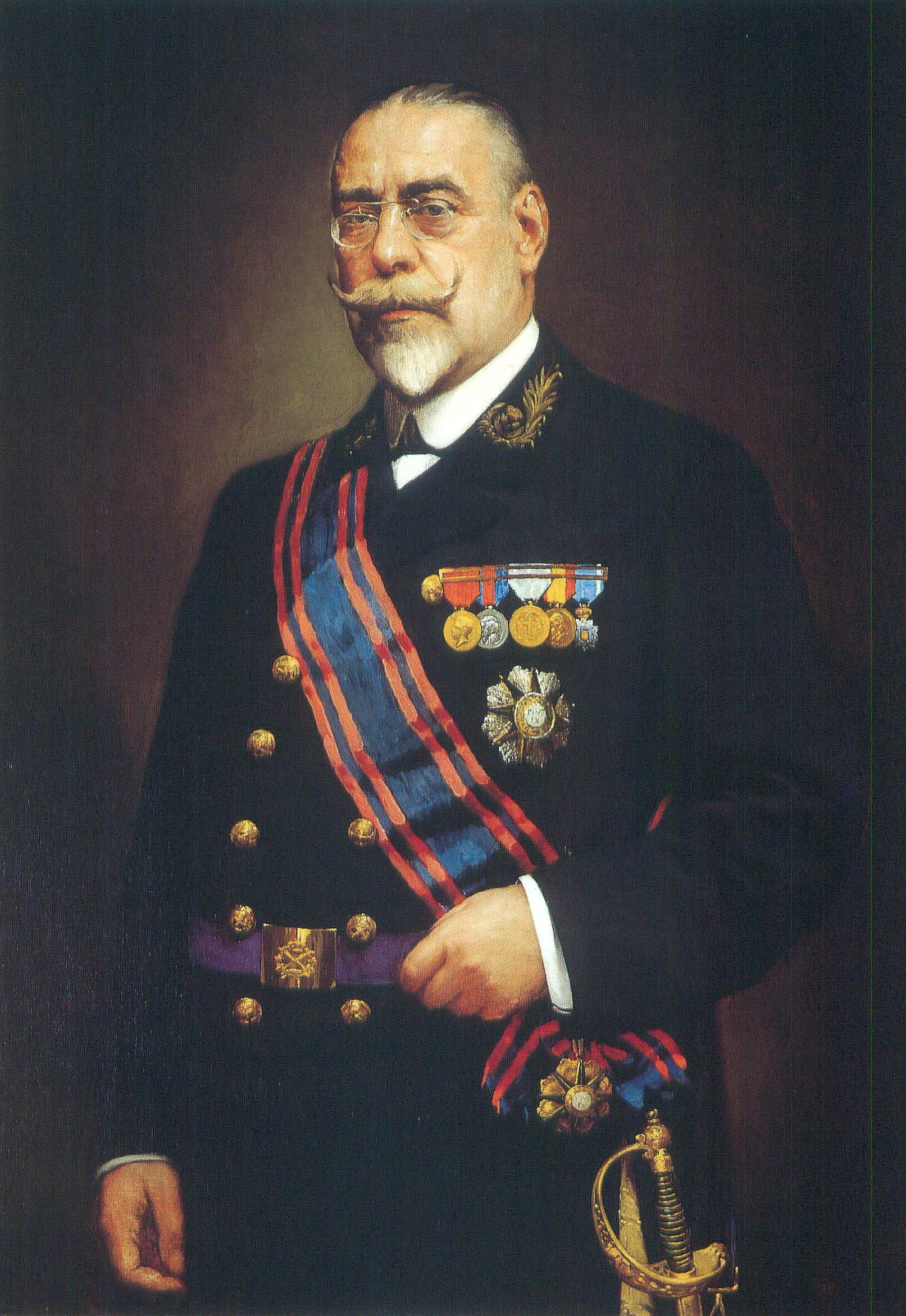 Retrato del aristócrata y político español Manuel Allendesalazar y Muñoz de Salazar (1856-1923), que llegó a ser presidente del Consejo de Ministros de España en dos ocasiones durante el reinado de Alfonso XIII.